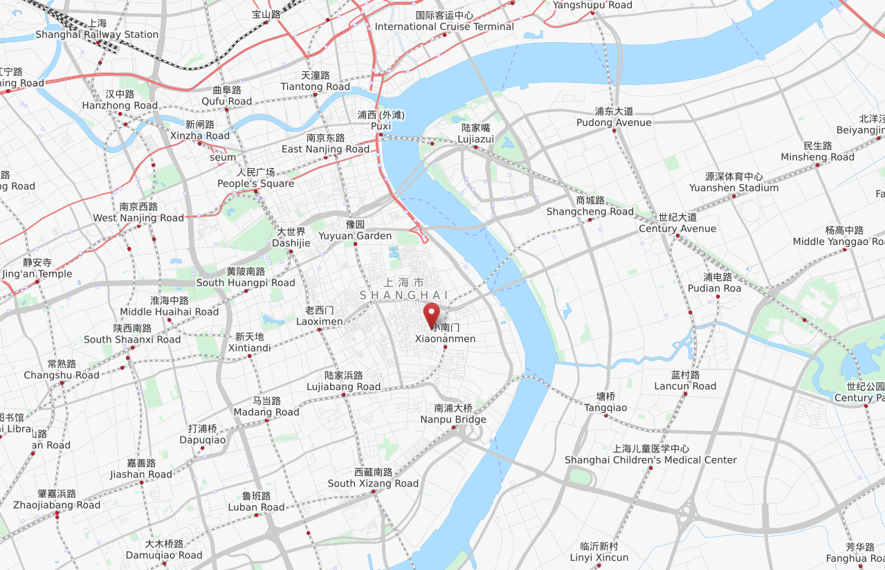 中文（中国大陆）: 天灯弄在上海的位置